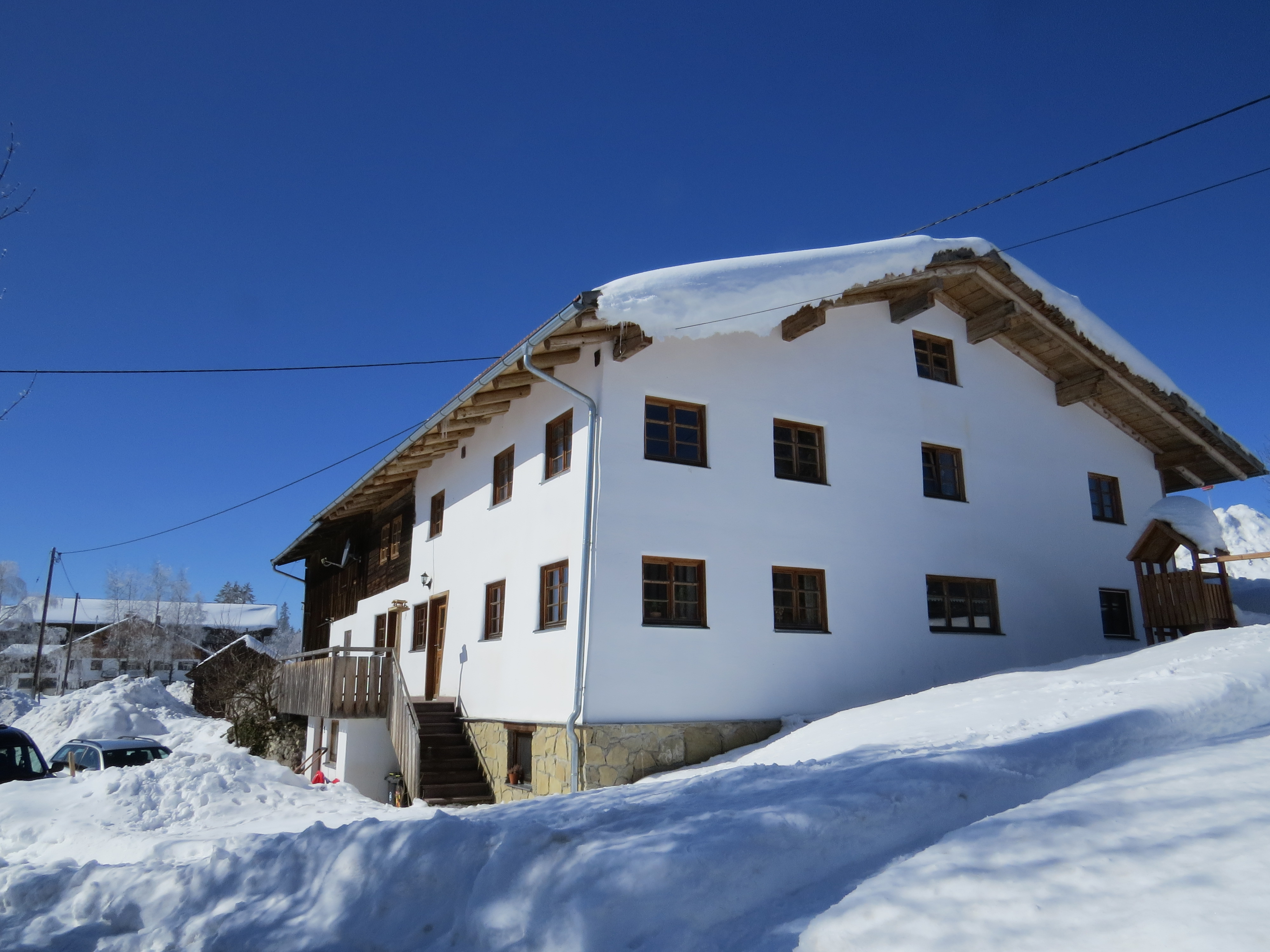 Unterellegg 2, Wertach